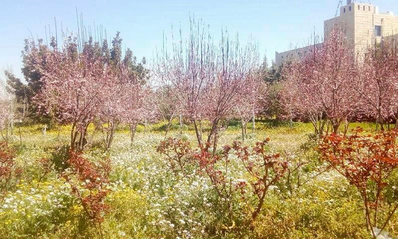 أحد المناظر الطبيعية في جامعة الزيتونة الأردنية الخاصة في عمان عاصمة المملكة الأردنية الهاشمية